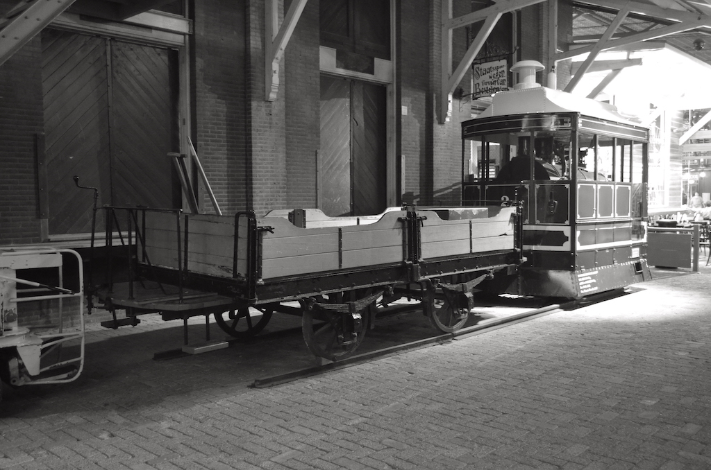 Nederlands Spoorwegmuseum wagen NTM Dk2. Foto: Erik Swierstra.